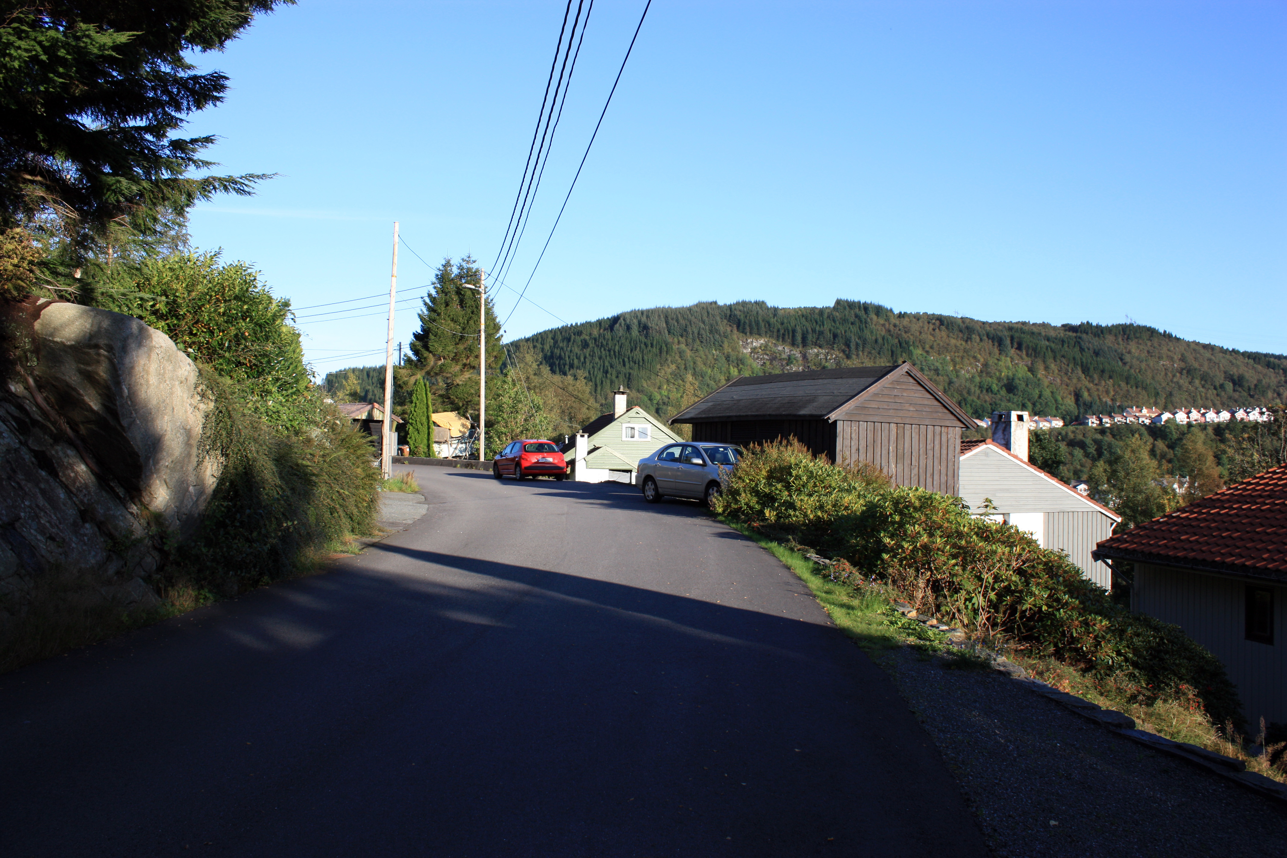 Øvsttunlia, Fana, Bergen.